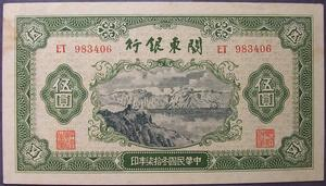 中文（中国大陆）: 关东币10圆券